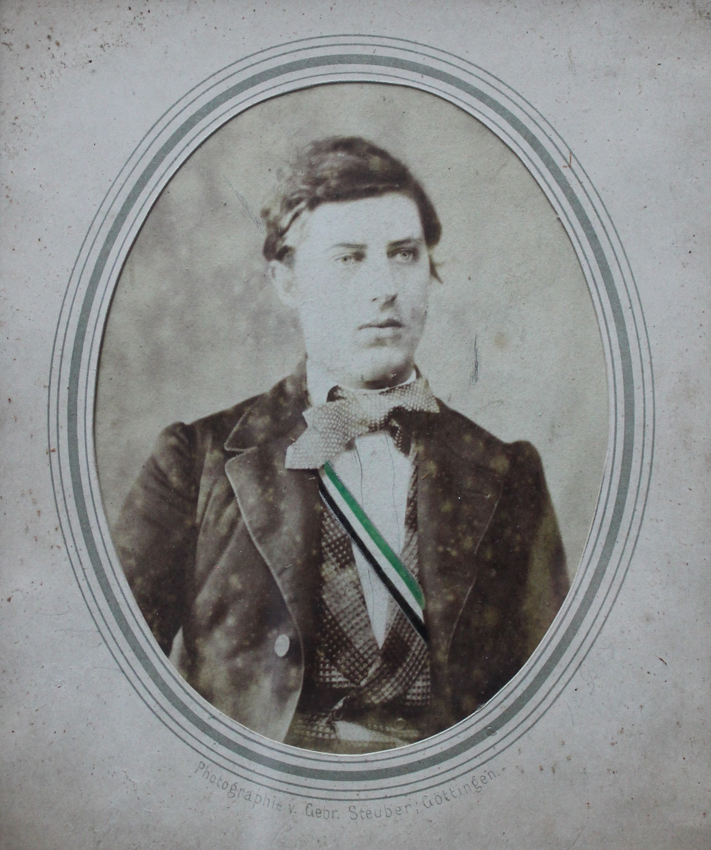 Porträtfotografie des späteren Geologen und Paläontologen Urban Schlönbach (1841–1970).